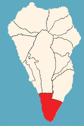 Localización del municipio de Fuencaliente